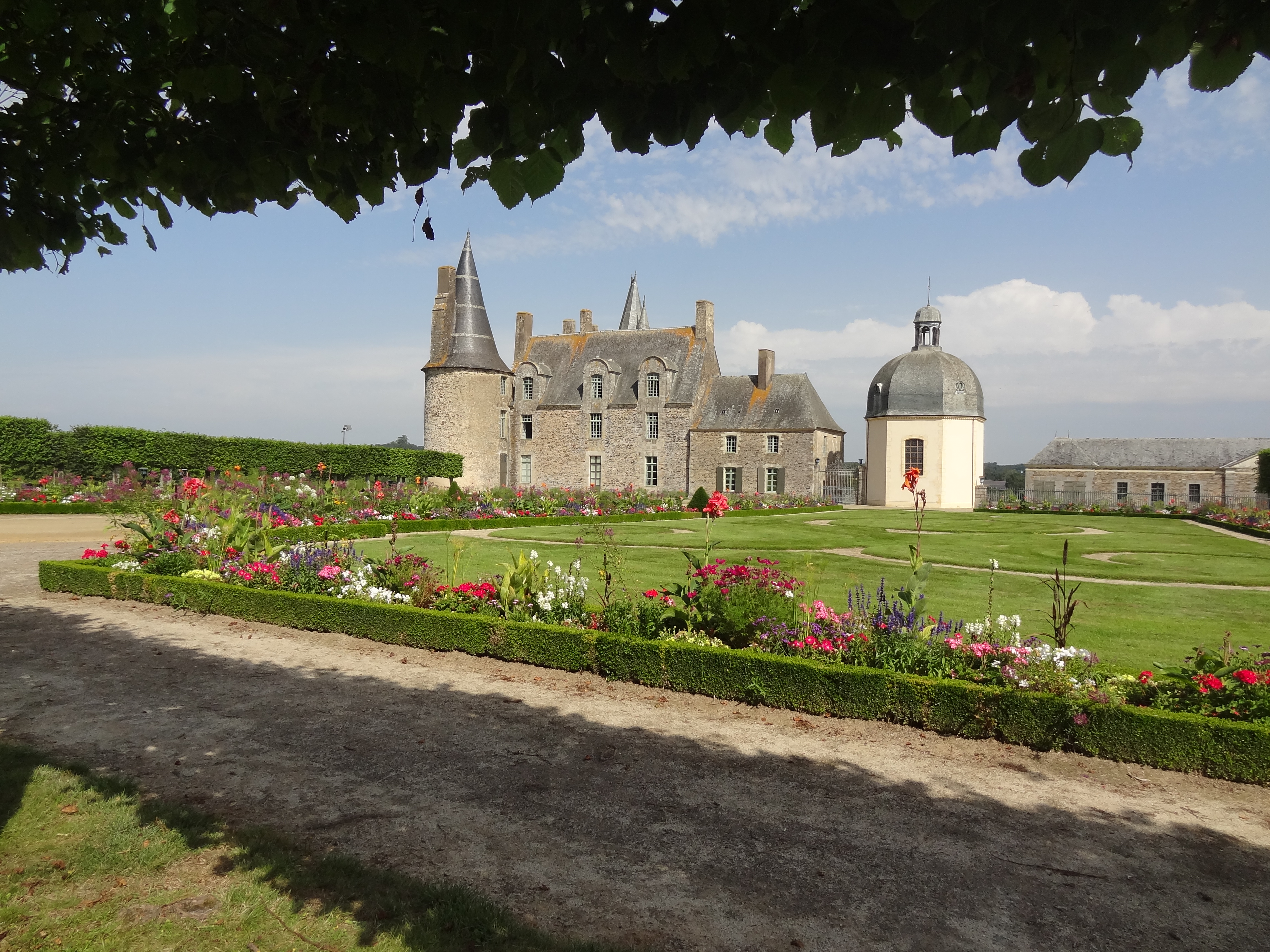 Jardin et château des Rochers-Sévigné à Vitré .